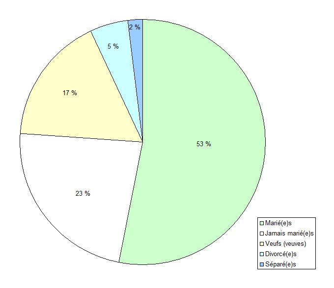 Statut marital de la population de Gladstone (Manitoba, Canada).